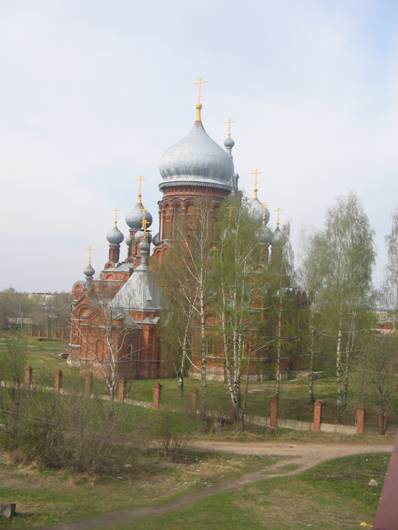 Фурманов. Храм Скорбящей Божией Матери